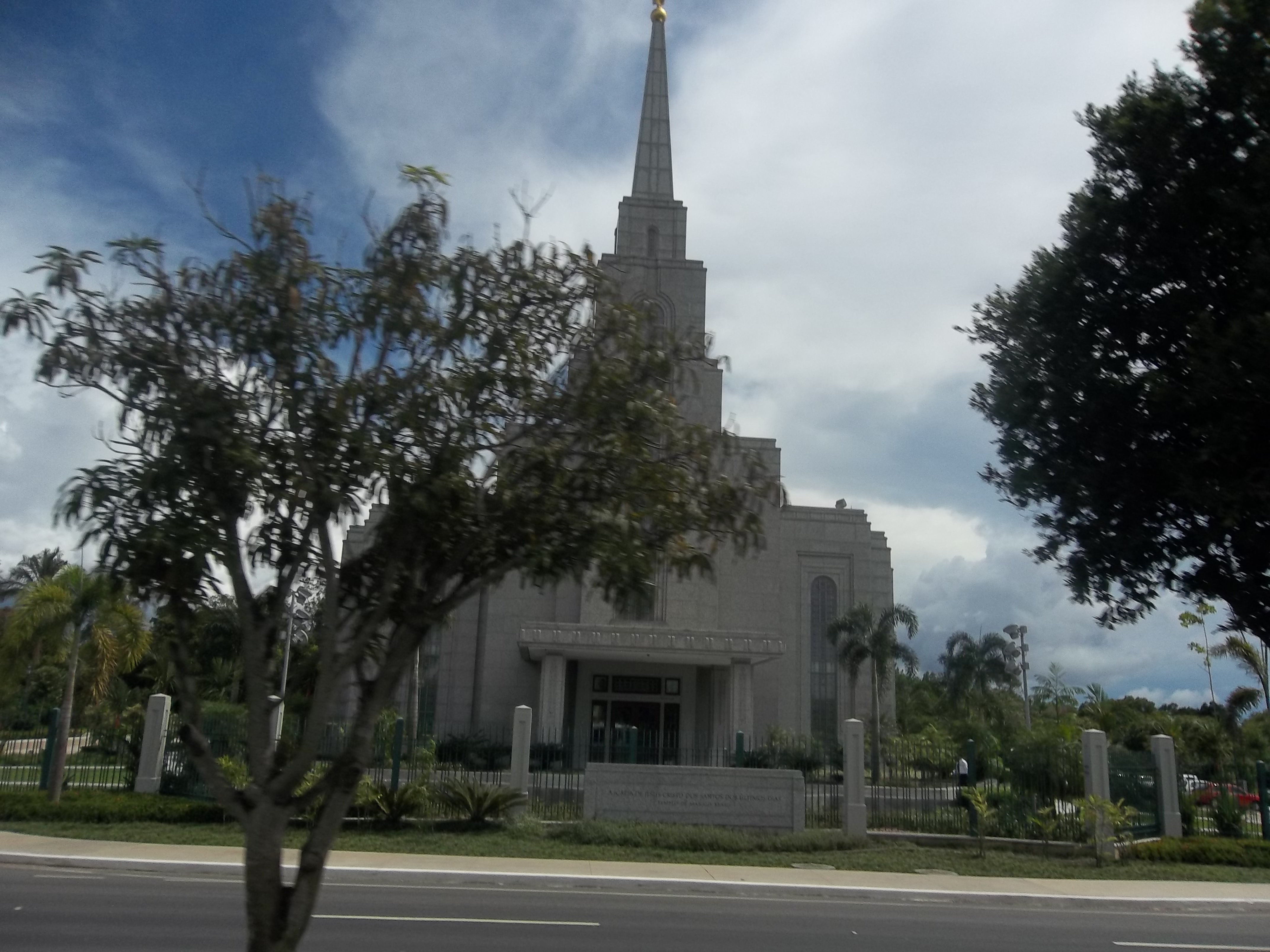 Vista do Templo SUD de Manaus, Amazonas, Brasil. Visão da parte de frente do templo.